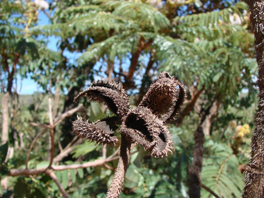 Mimosa claussenii Benth. - FABACEAE - Brasília - Distrito Federal - Brasil.